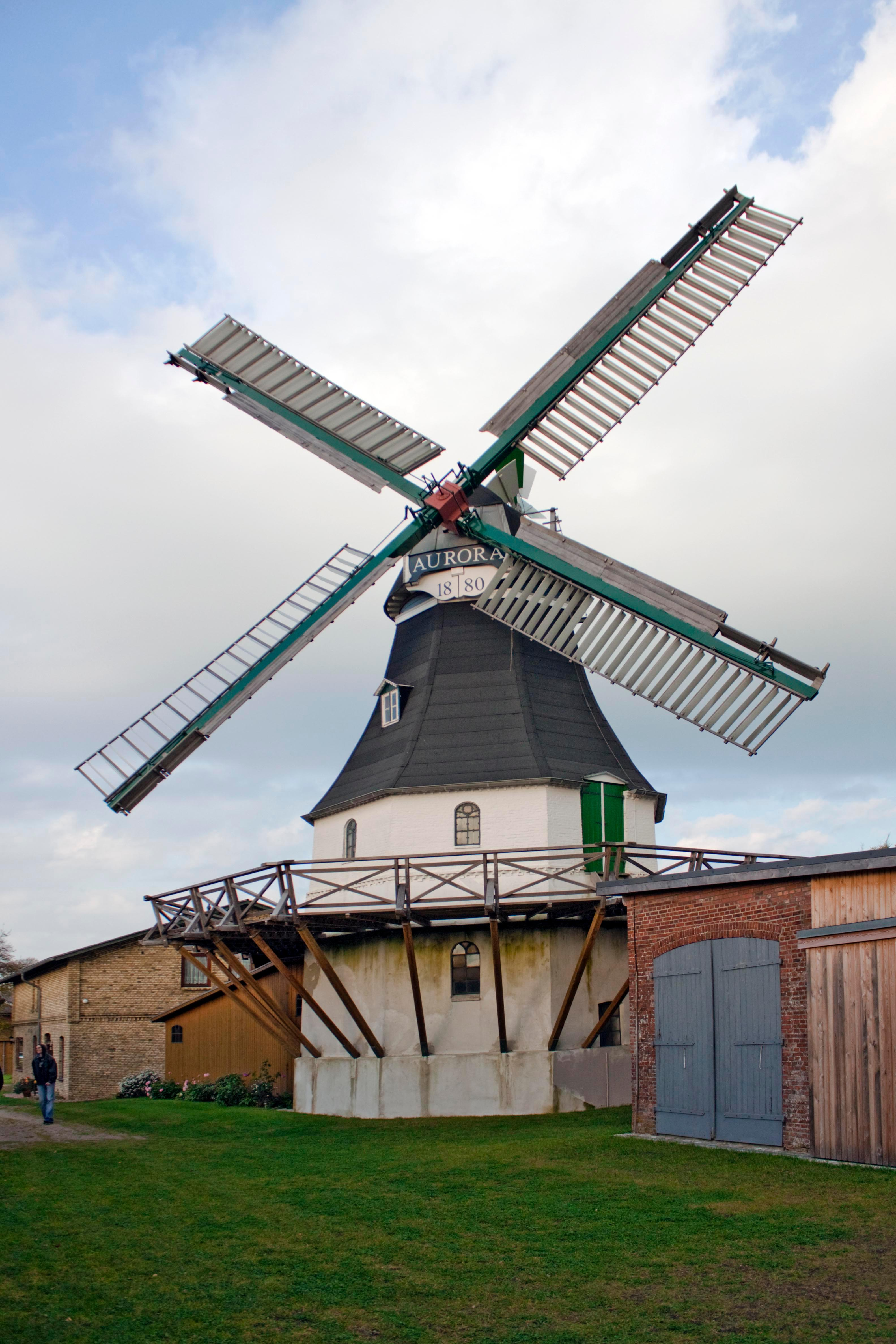 Zweistöckigen Galerieholländer Aurora mit Jalousieflügeln und Windrose in Weddingstedt